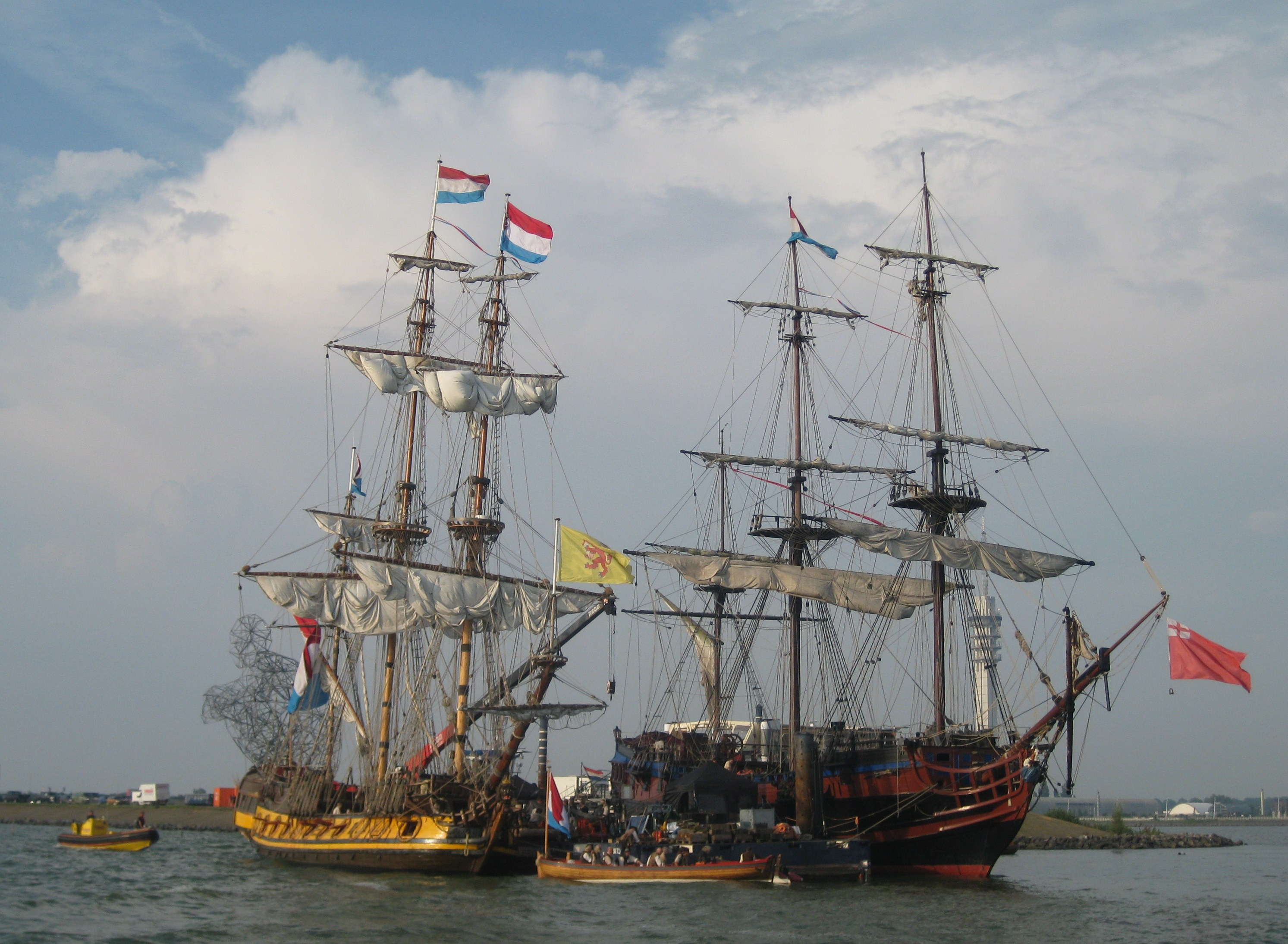 Opnamen van de speelfilm Michiel de Ruyter in het Markermeer bij Lelystad. Met links de Shtandart en rechts de Etoile du Roy